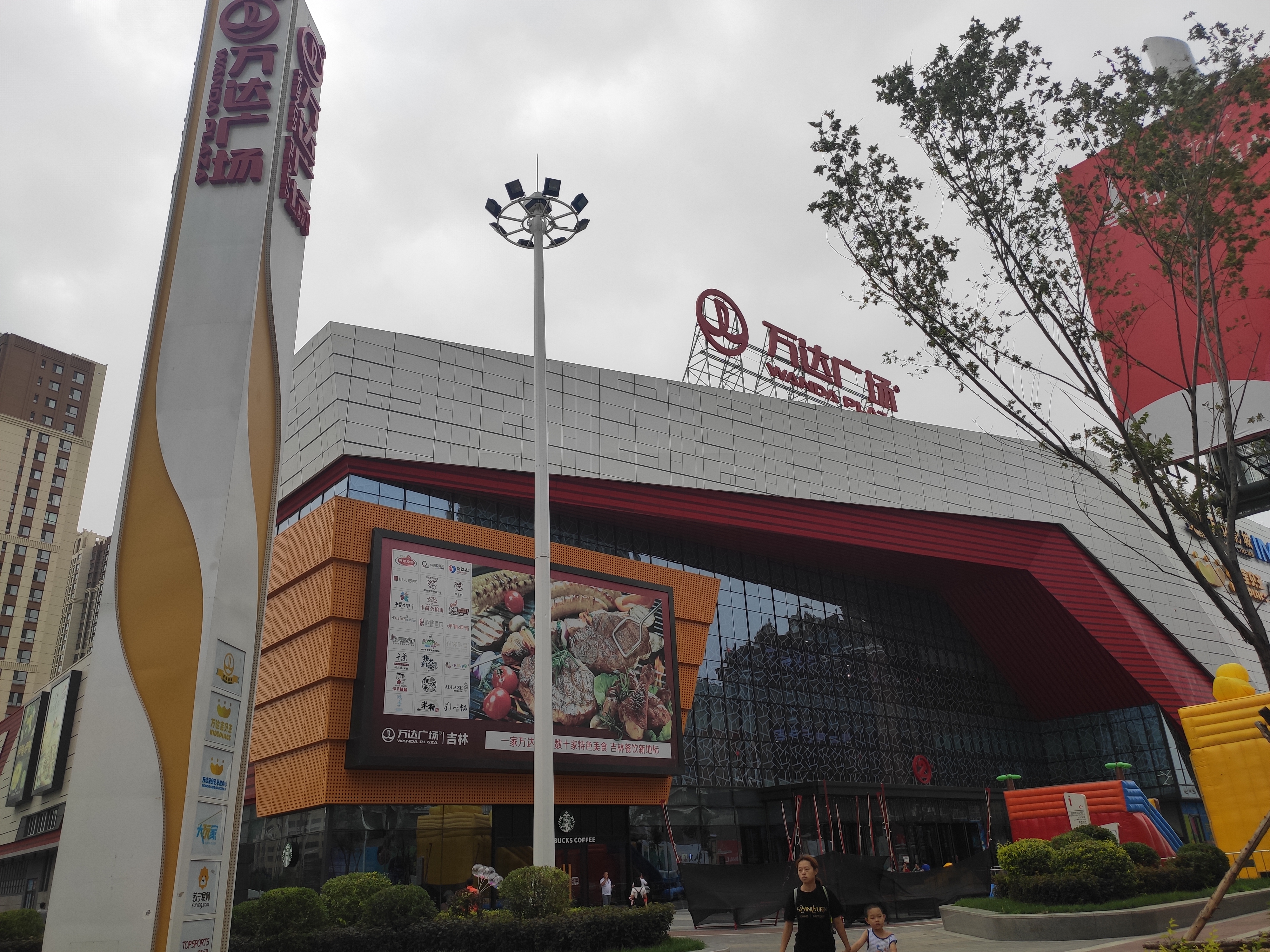 吉林市昌邑万达广场